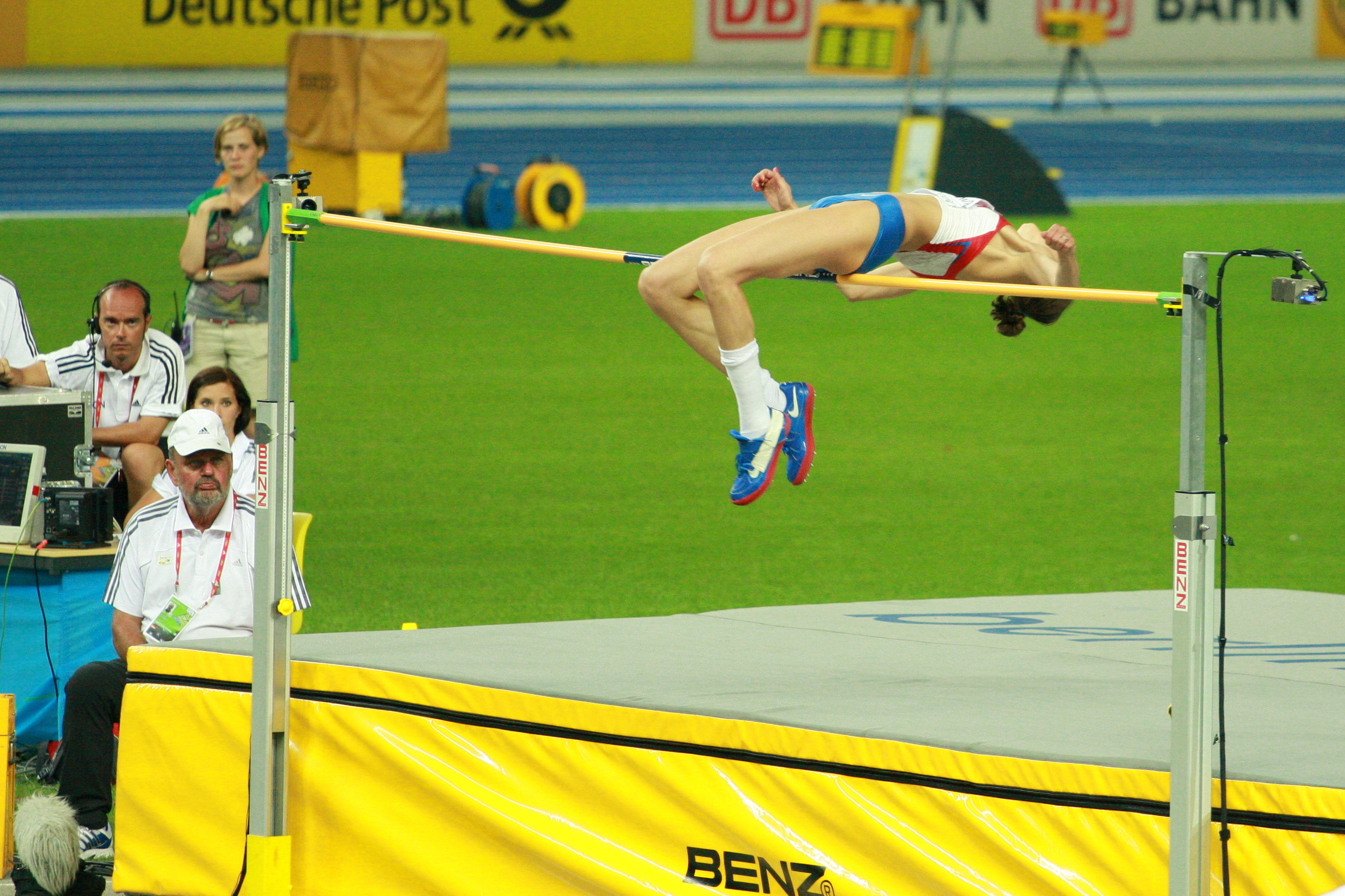 Silver Medalist